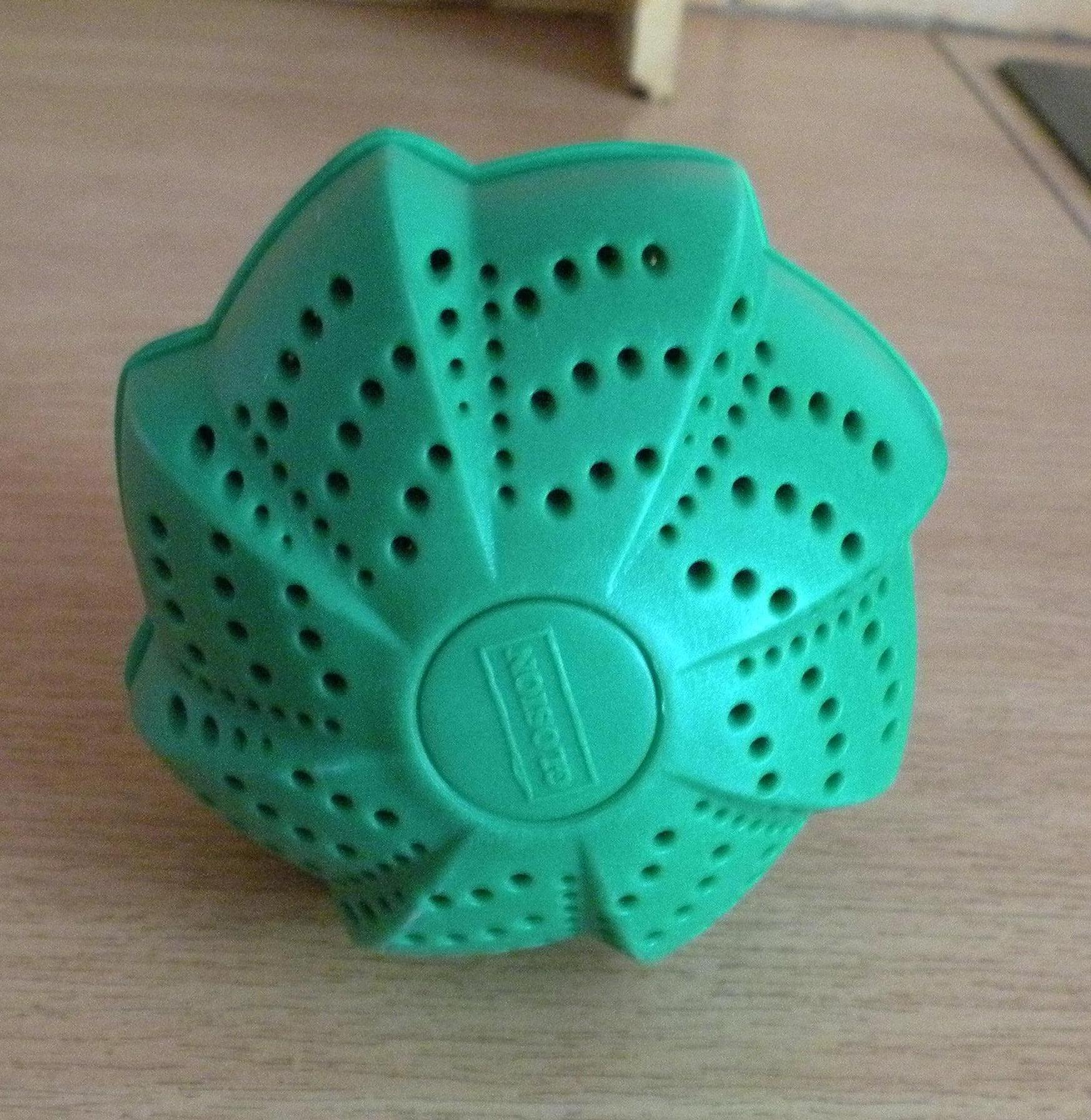 boule de lavage en remplassement de la lessive